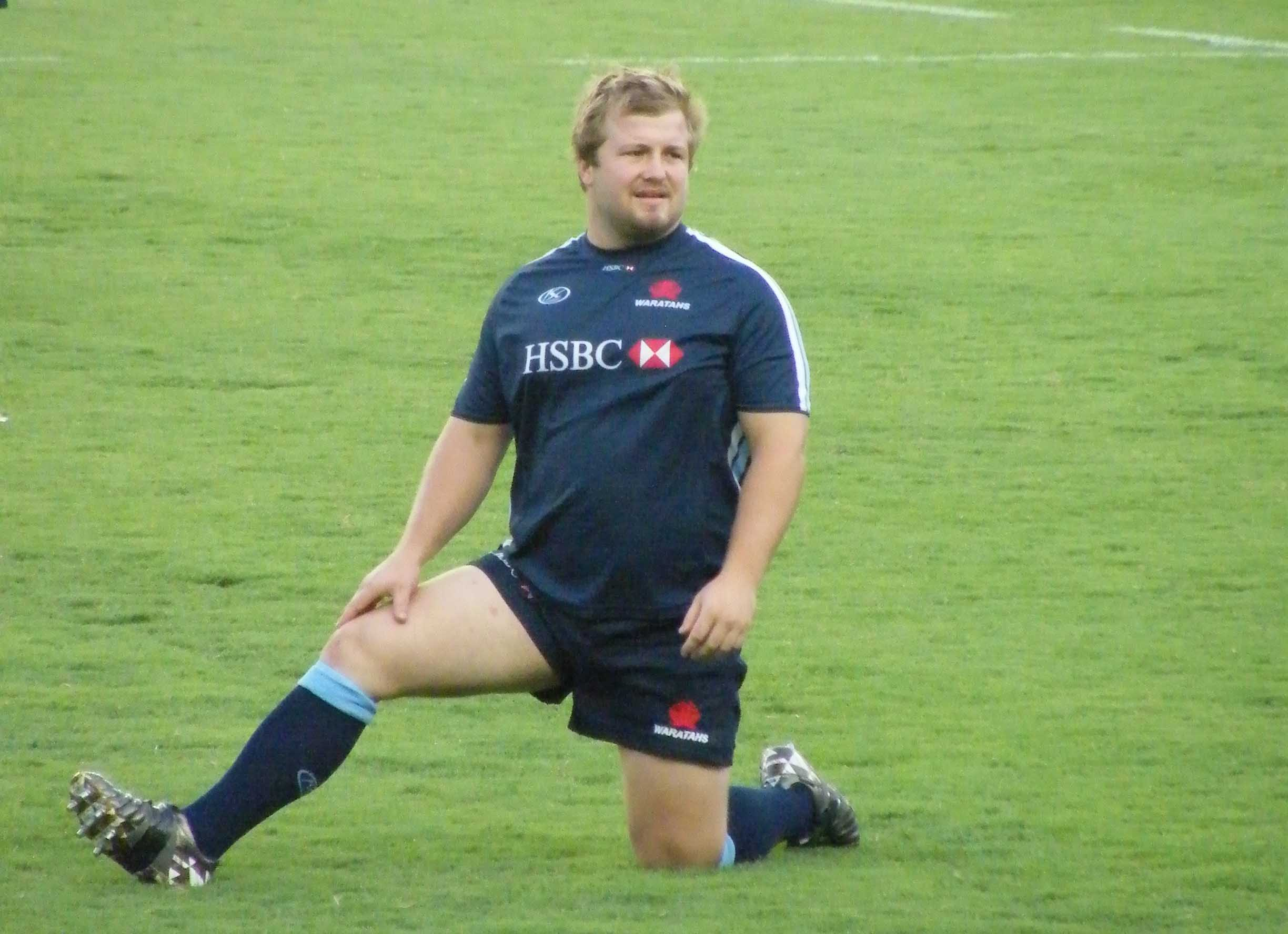 Waratahs Prop Benn Robinson